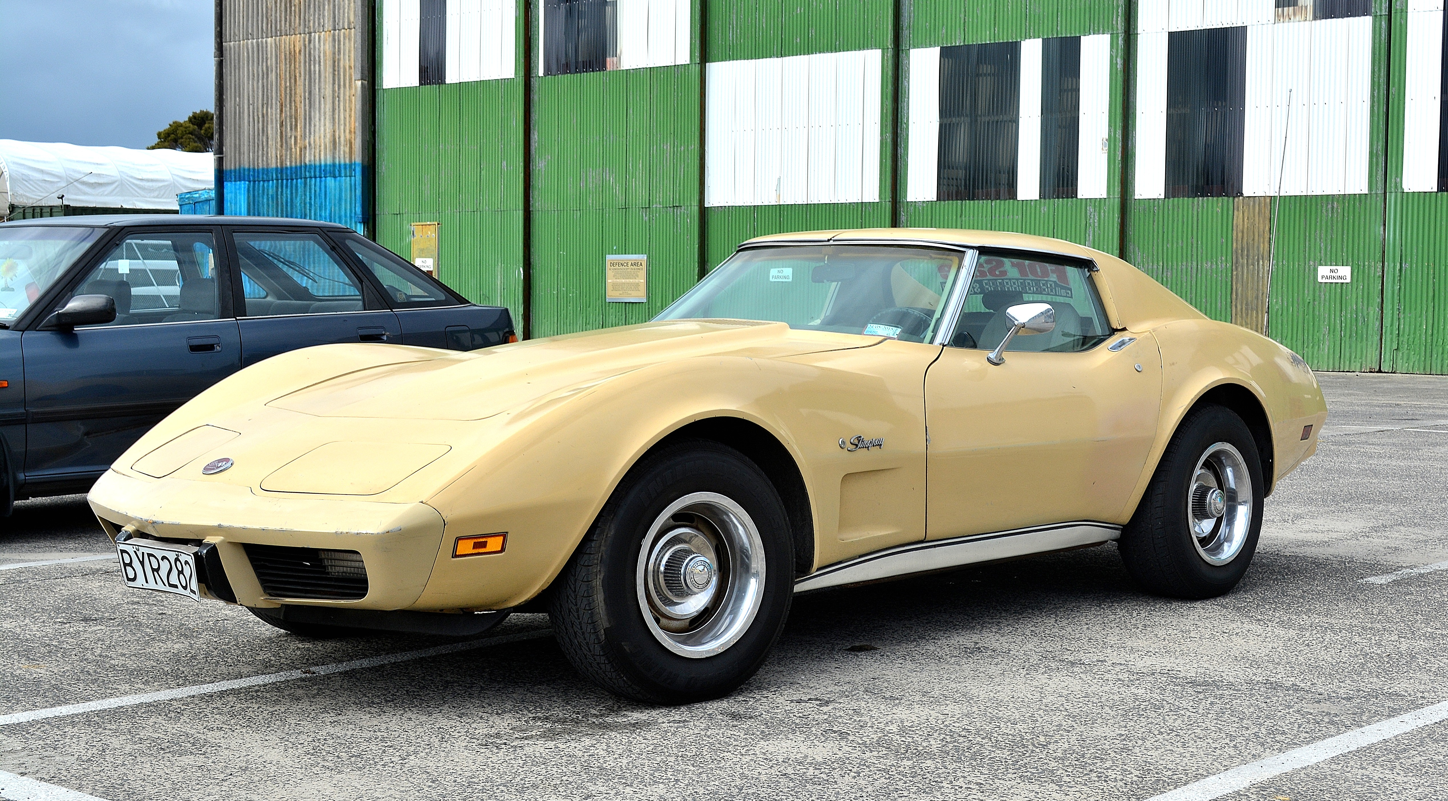 1975 Chevrolet Corvette